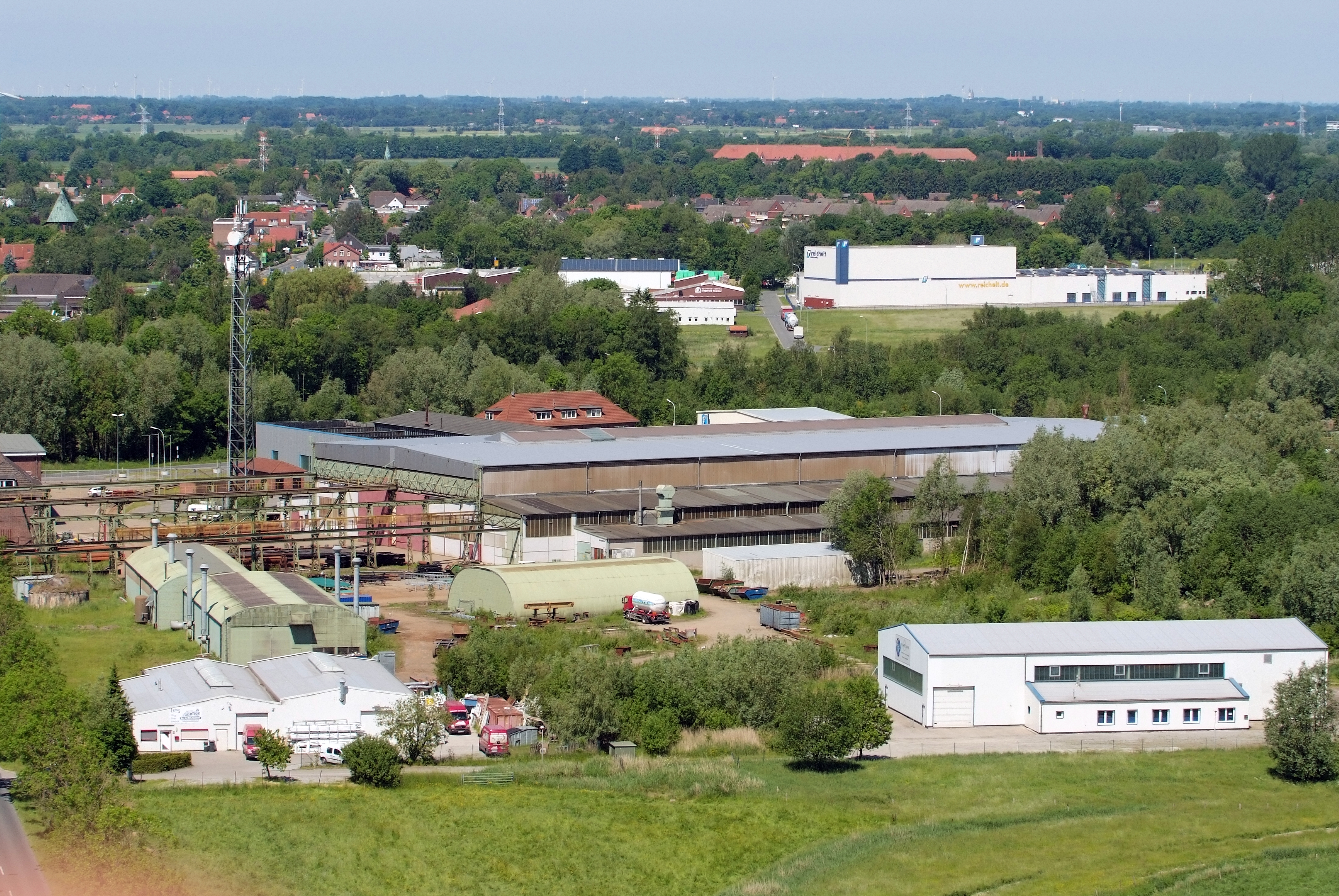 Fotoflug vom Flugplatz Nordholz-Spieka über Cuxhaven und Wilhelmshaven